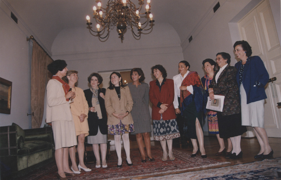 Marta Larraechea recibe a las políticas María Elena Carrera, Carmen Frei, Isabel Allende, Olga Feliú, Fanny Pollarolo, Evelyn Matthei, entre otras.